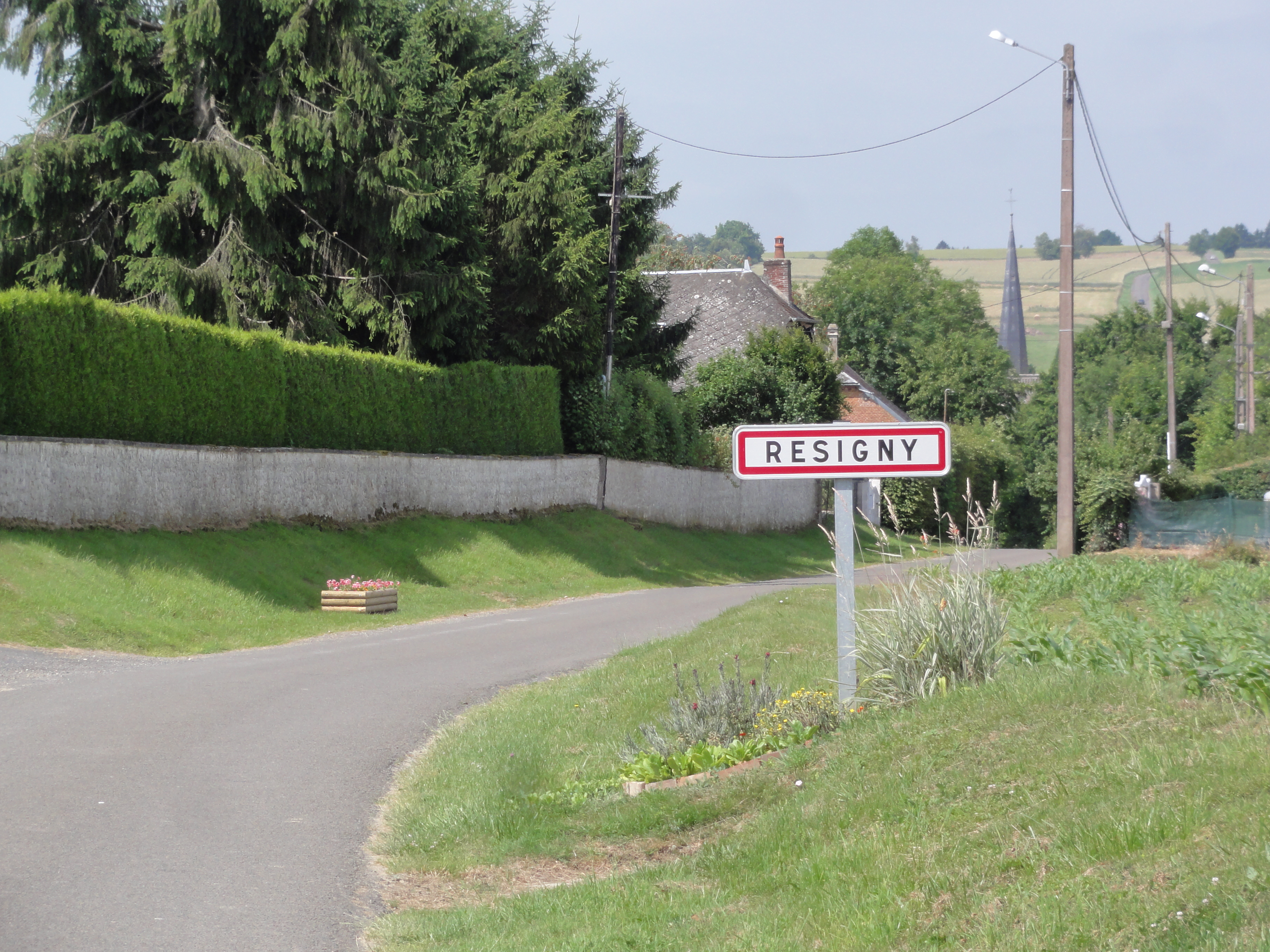 Résigny (Aisne) city limit sign